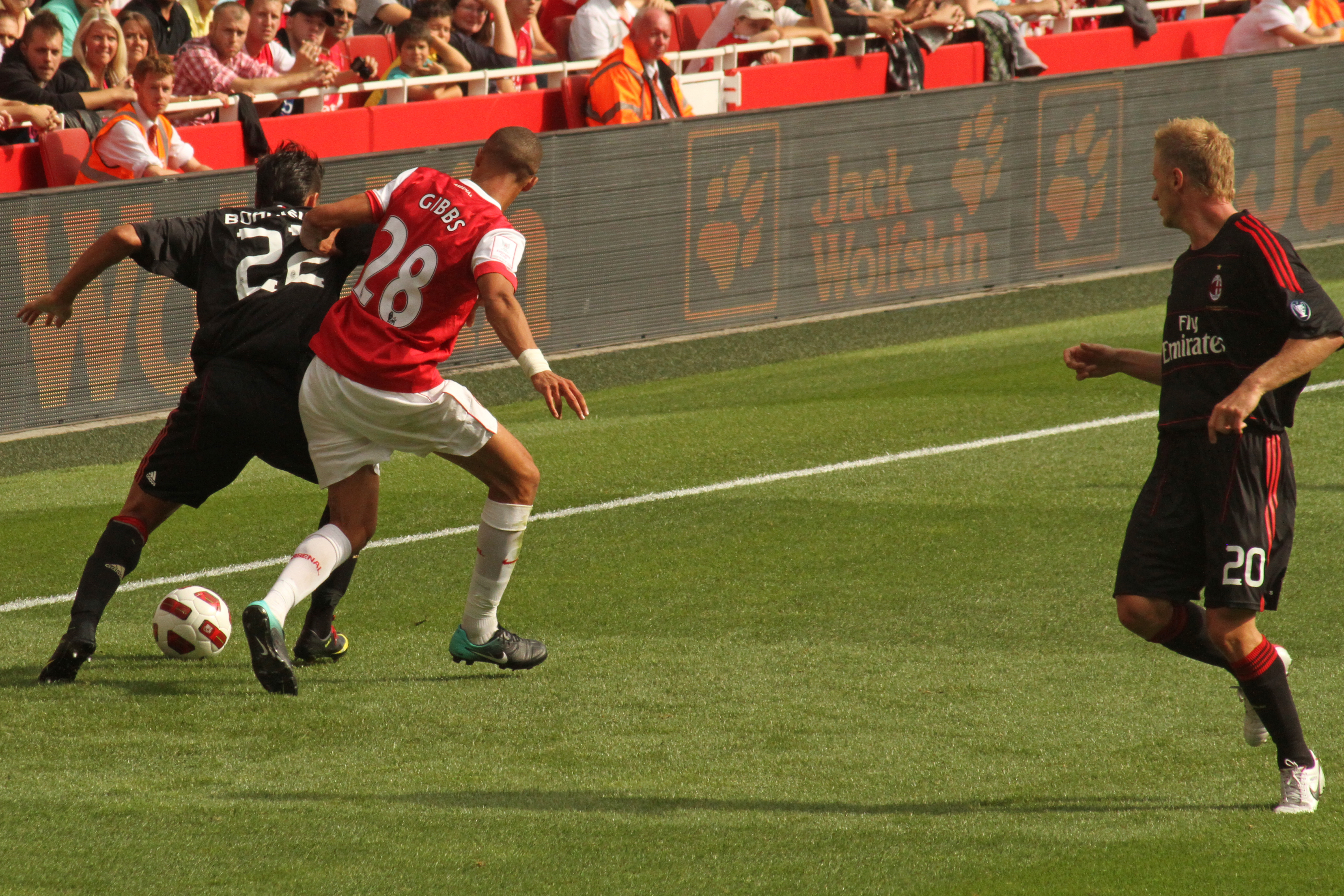 Marco Borriello, Kieran Gibbs & Ignazio Abate